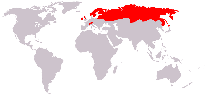 Tiriad ar c'had-venez.